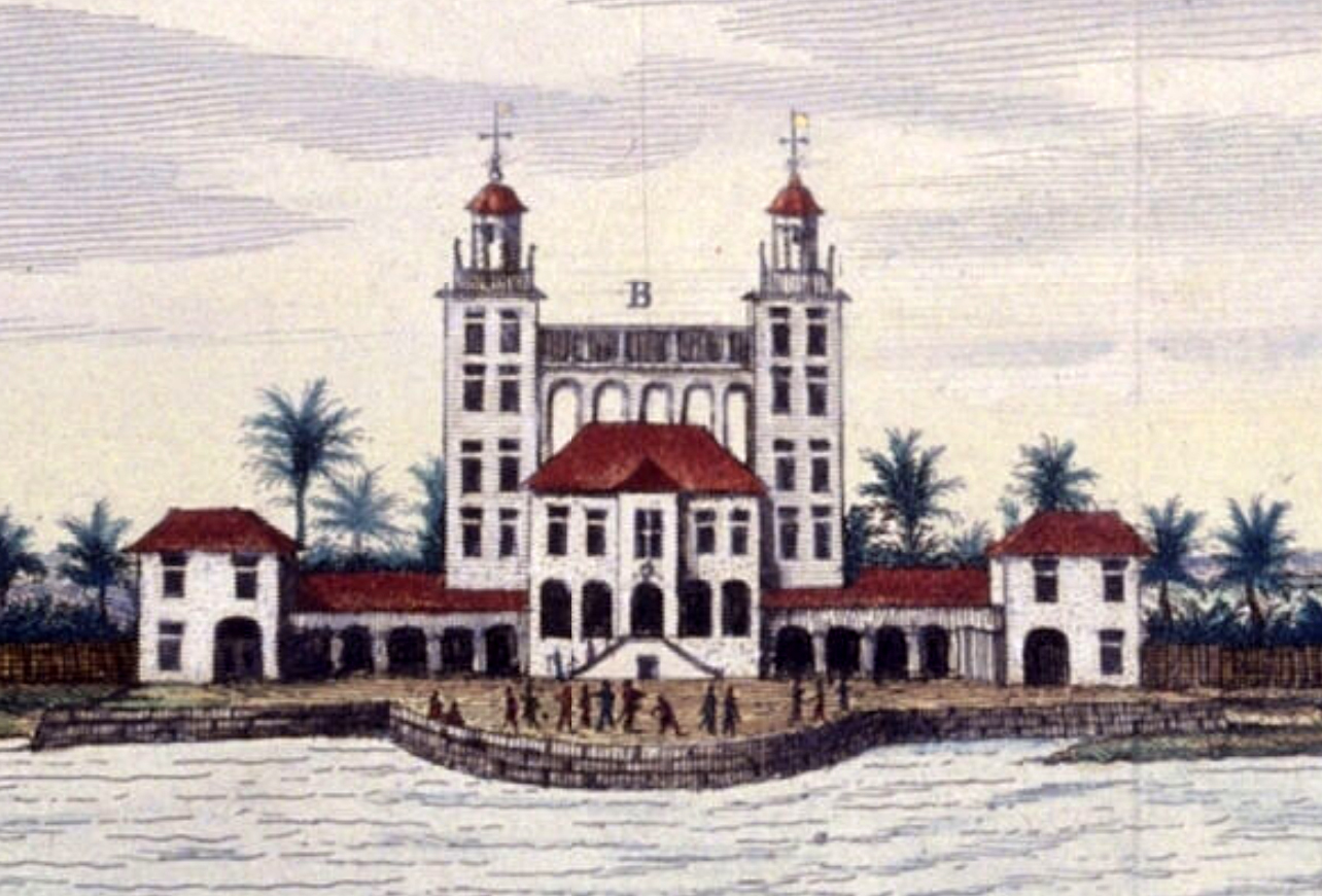 Palácio de Friburgo, local de residência e de despachos de Maurício de Nassau situado na capital do Brasil Holandês, Recife.